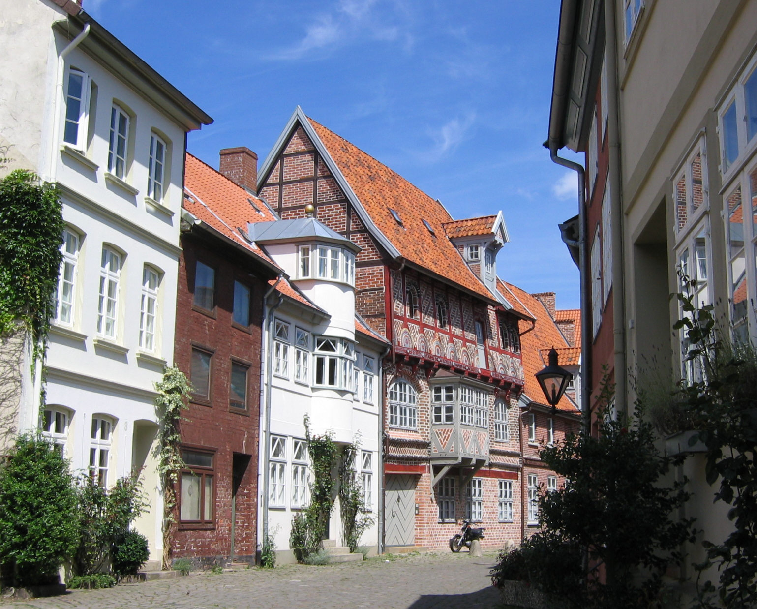 Obere Ohlingerstraße in der Lüneburger Altstadt